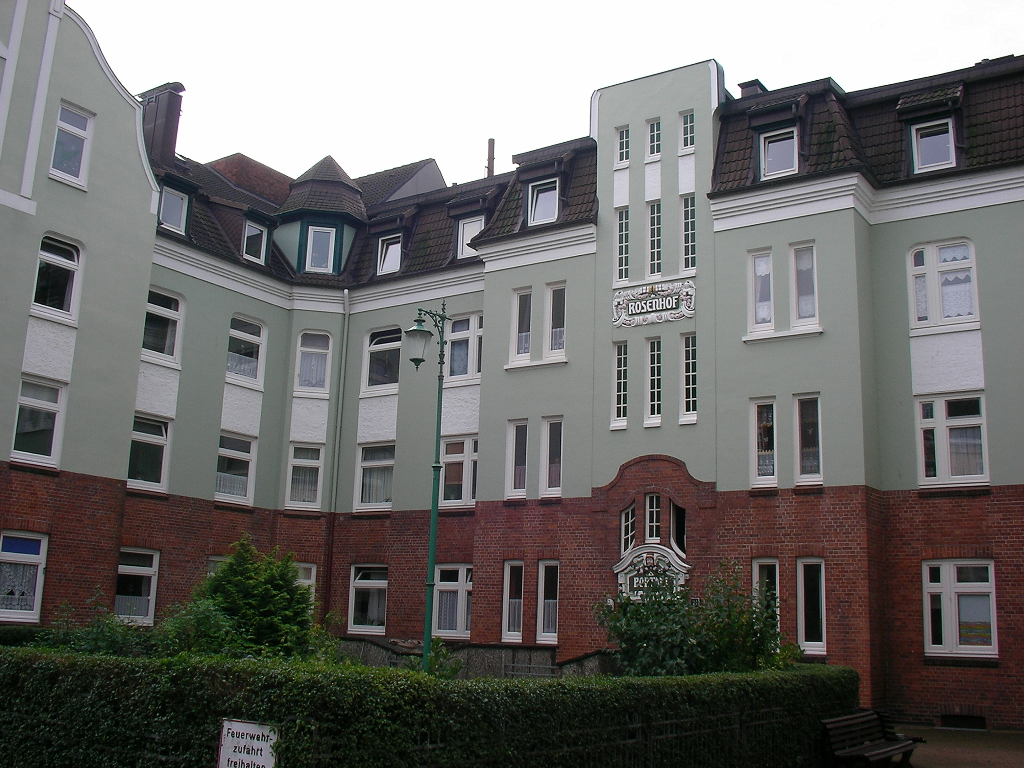 Rosenhof